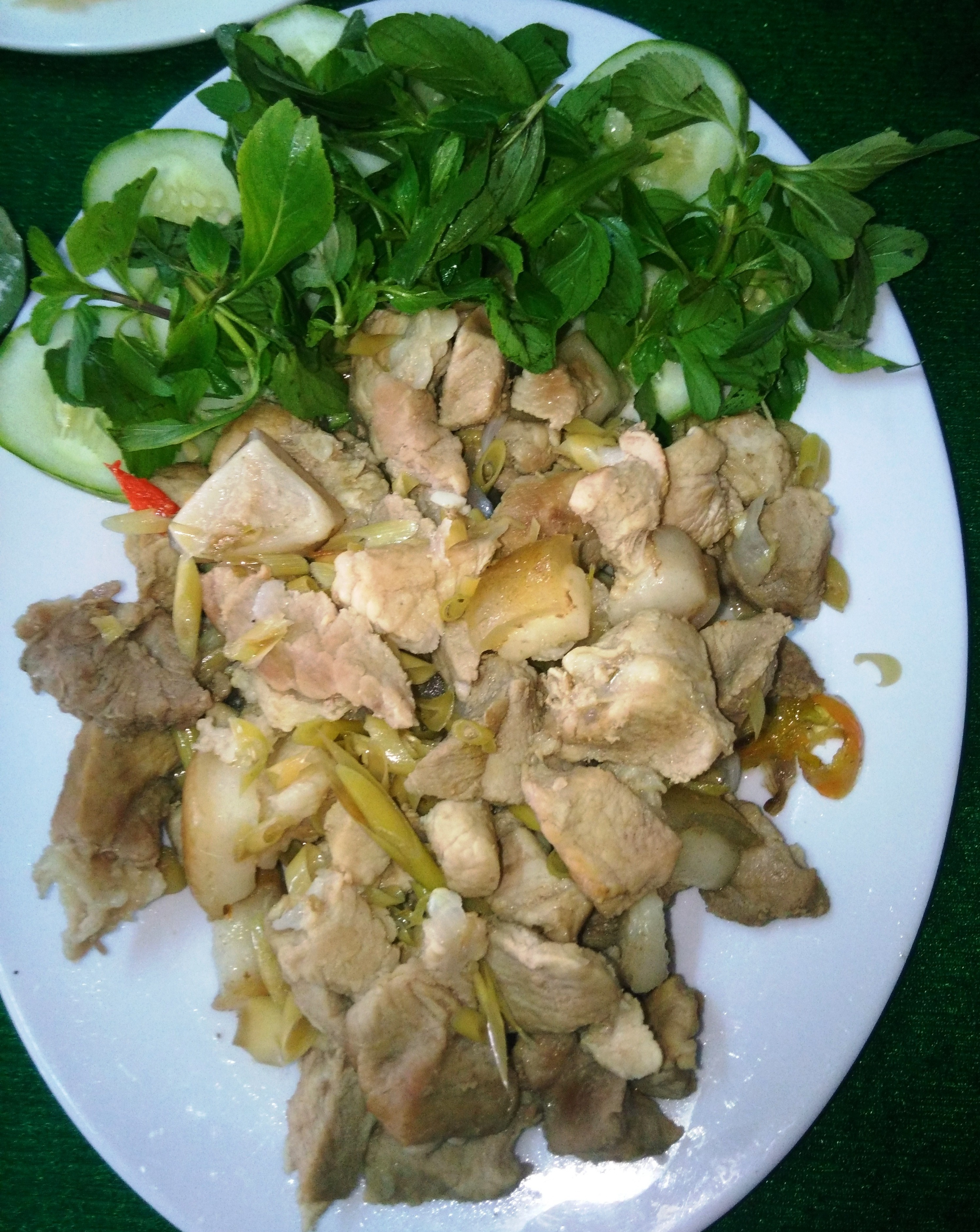 Thịt nạc rau răm